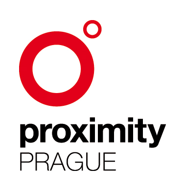 logo Proximity Prague